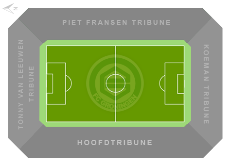 De namen van de tribunes in de Euroborg